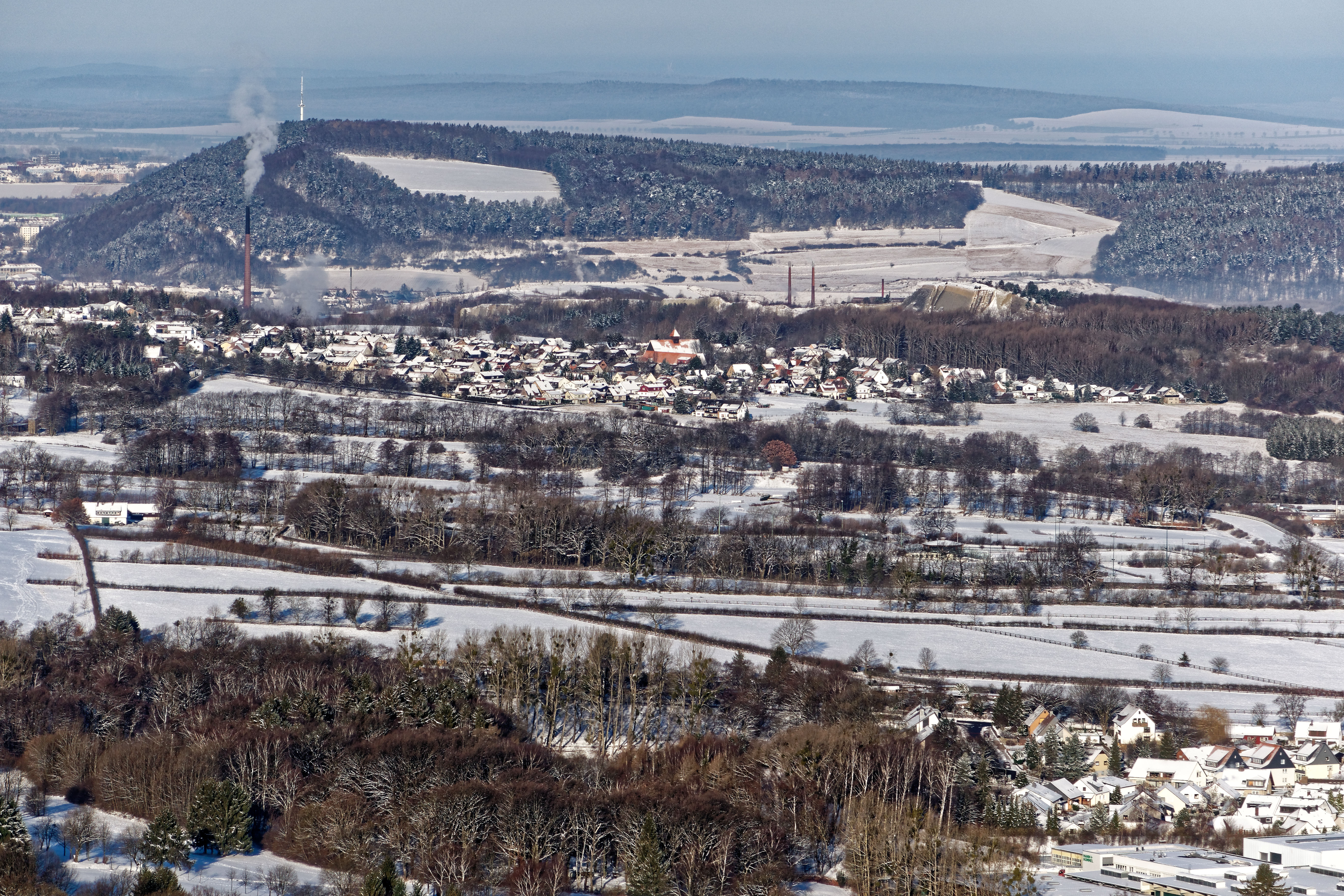 Blick vom Großen Burgberg auf das nordwestliche Harzvorland. Im Vordergrund die Harzburger Rennbahn mit dem Sportpark Bad Harzburg. Dahinter Göttingerode mit dem Langenberg und hinter diesem schließlich der Sudmerberg. In der unteren rechten Ecke die westliche Ecke von Bündheim